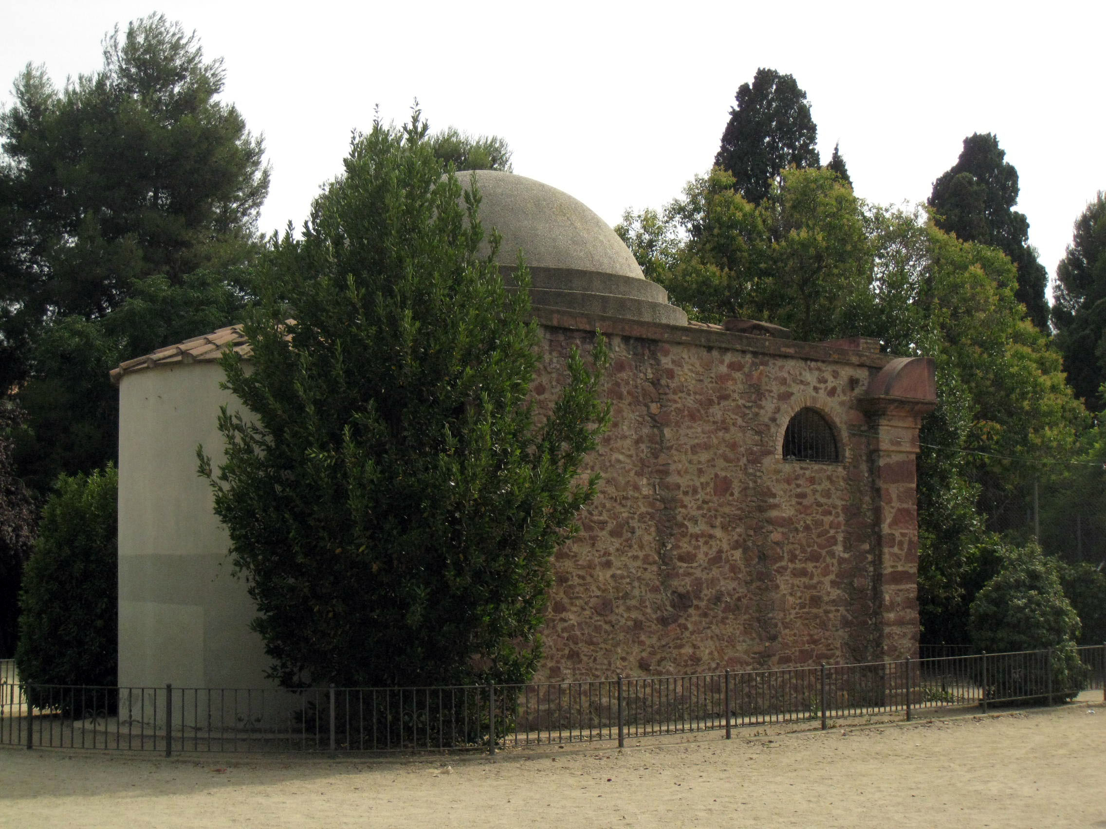 Capella del Cementiri Vell, al carrer de Wagner (Terrassa). Edifici neoclàssic de final del segle XVIII.